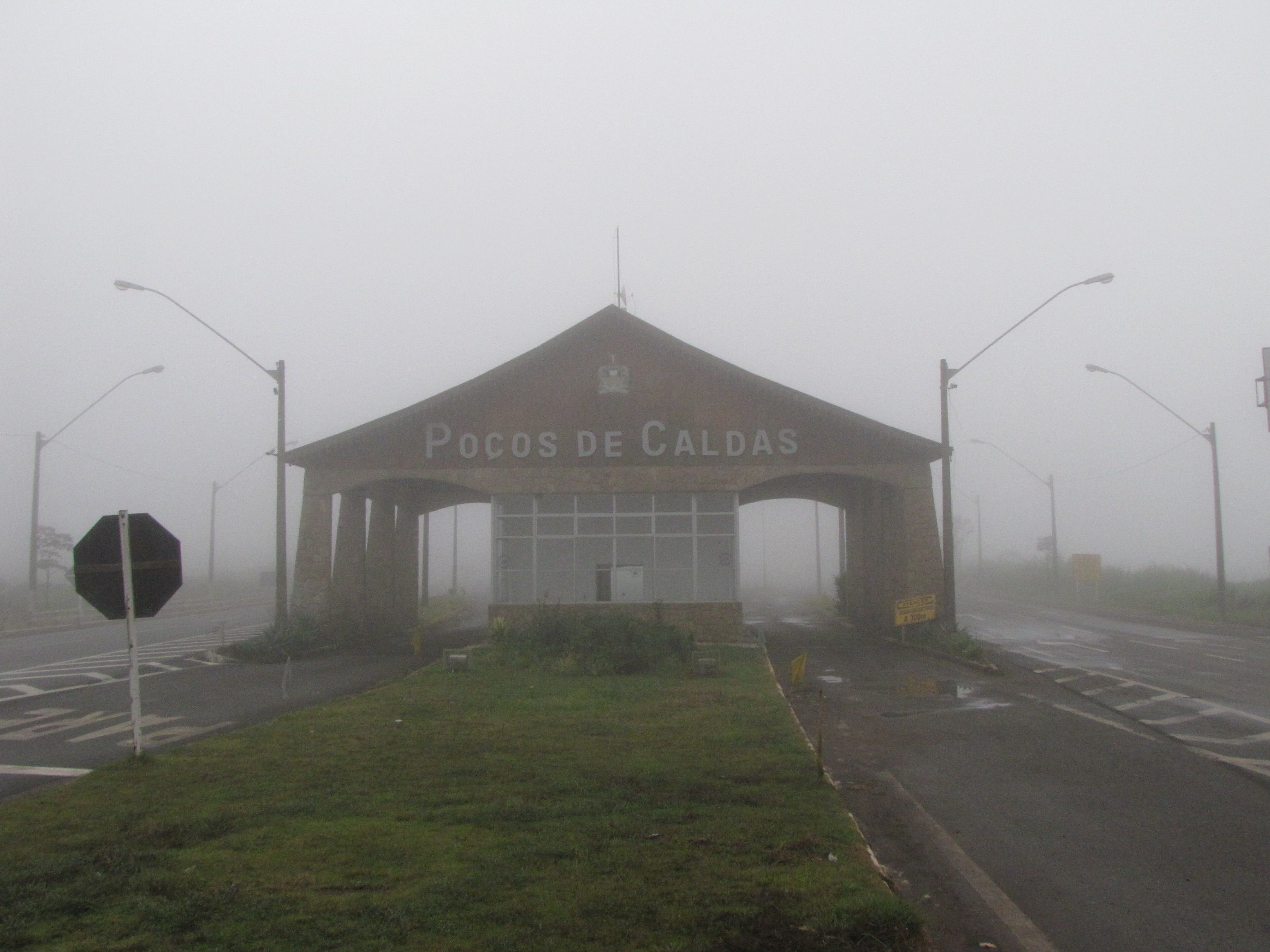 Neblina cobre o Portal de Poços de Caldas.